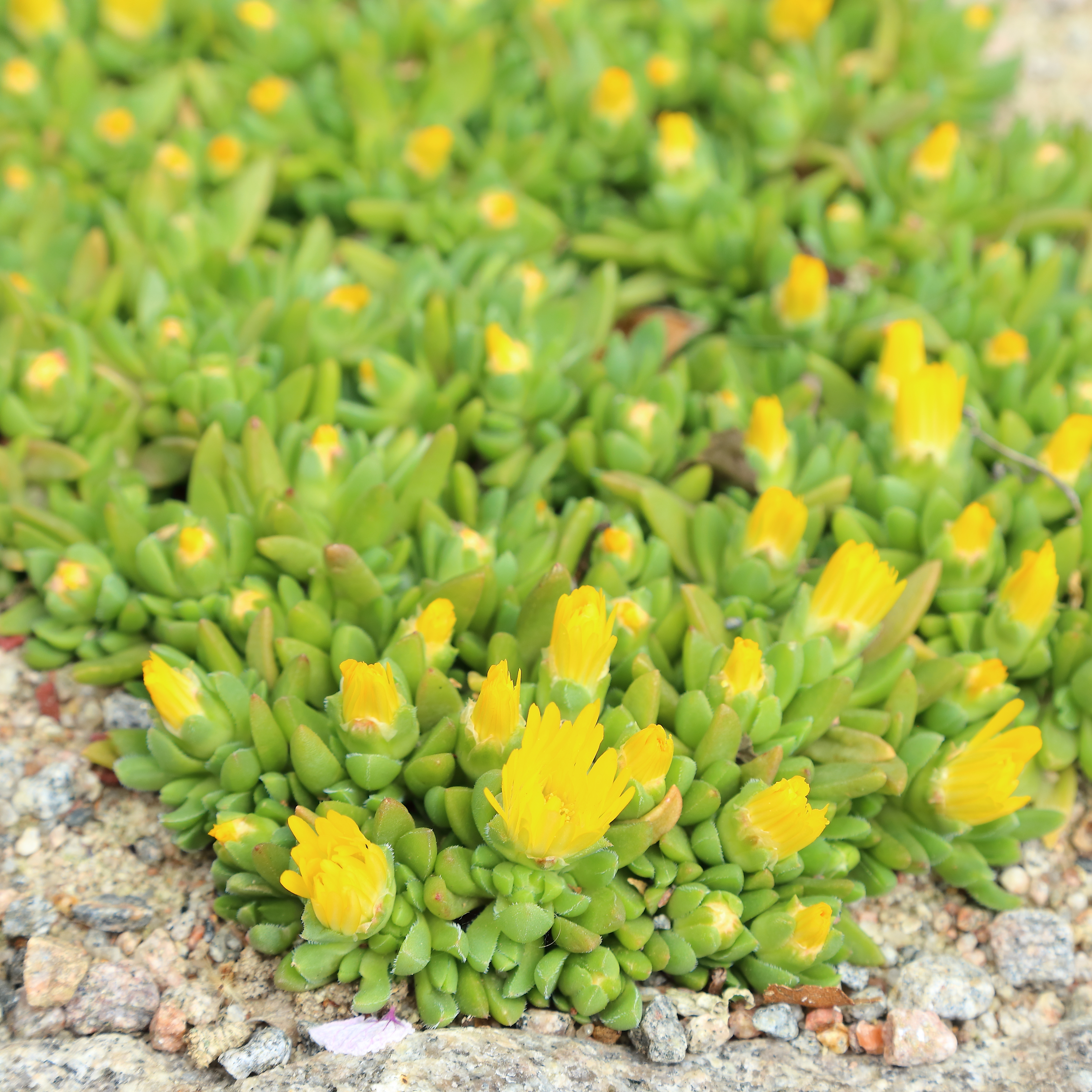 Delosperma basuticum identifierad med hjälp av skylt i Göteborgs botaniska trädgård.